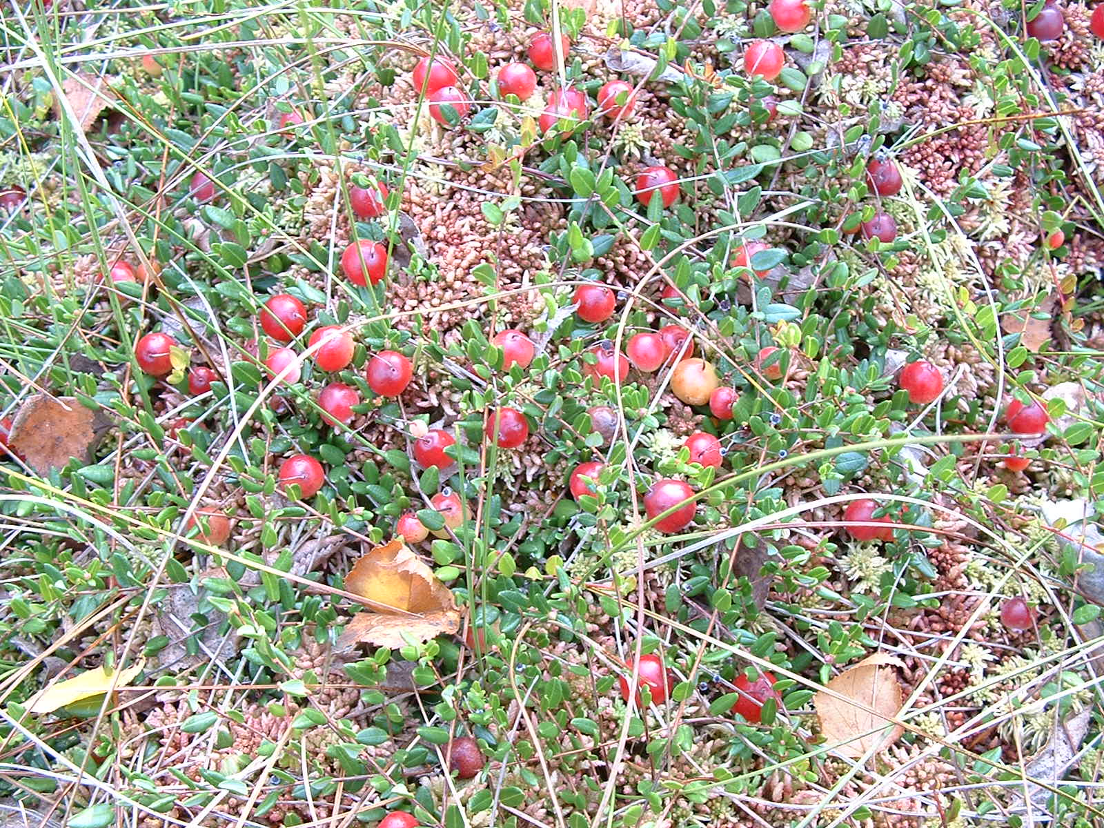 Gemeine Moosbeere Fruechte Northern Cranberry